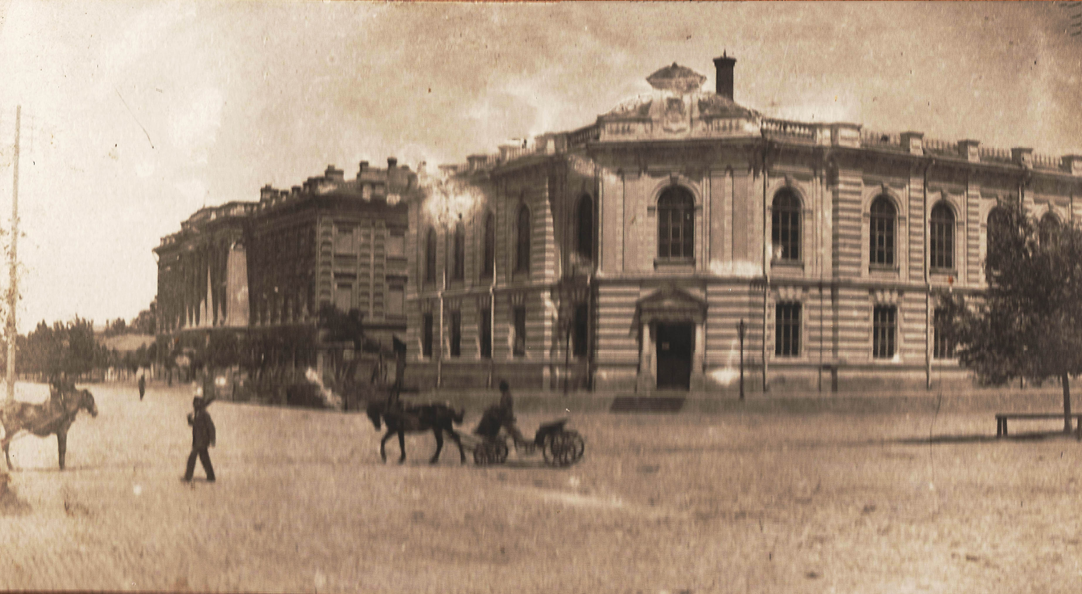 Донской музей в Новочеркасске, перекресток пр. Баклановского и ул. Атаманской